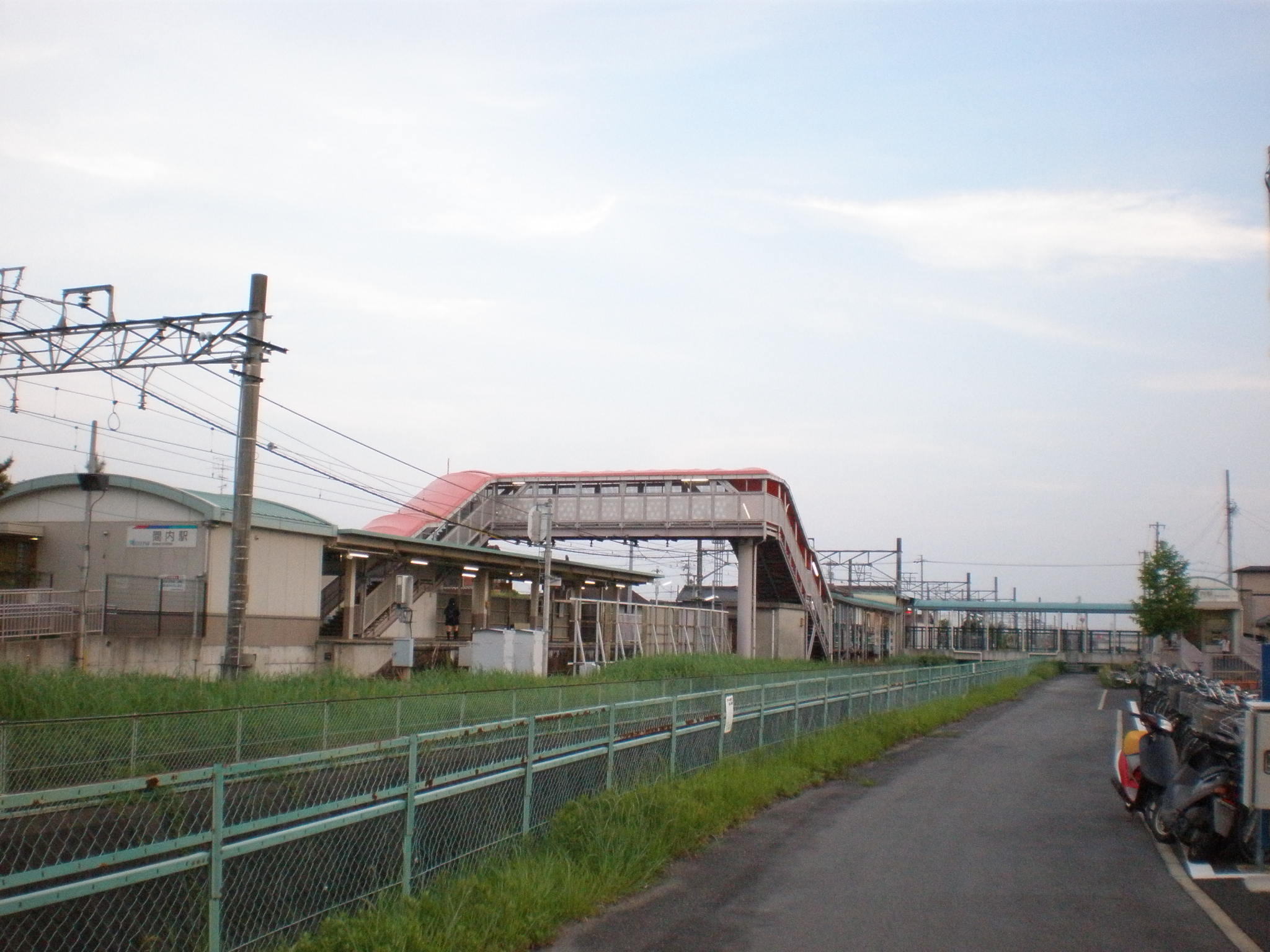 愛知県春日井市にある間内駅